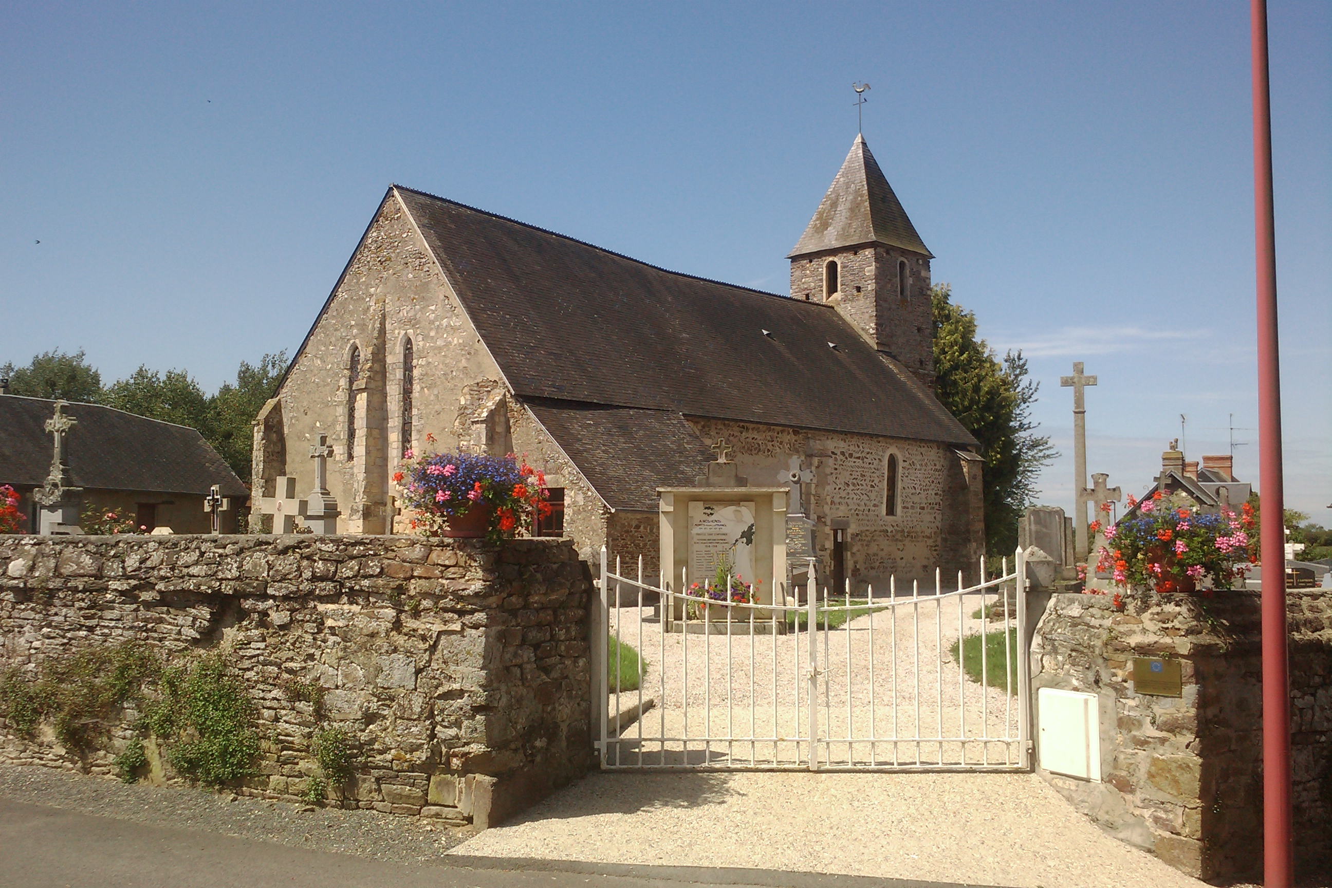 église de Saint-Symphorien-les-Buttes, commune associé à Saint-Amand (Manche)